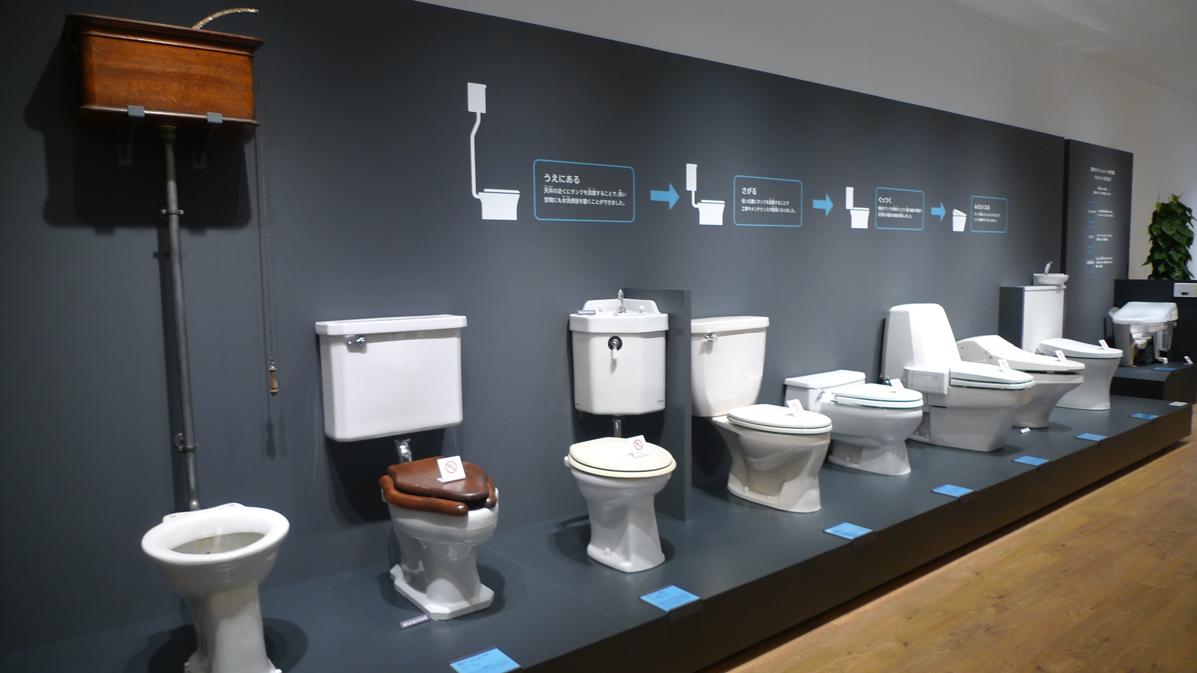 L1250247